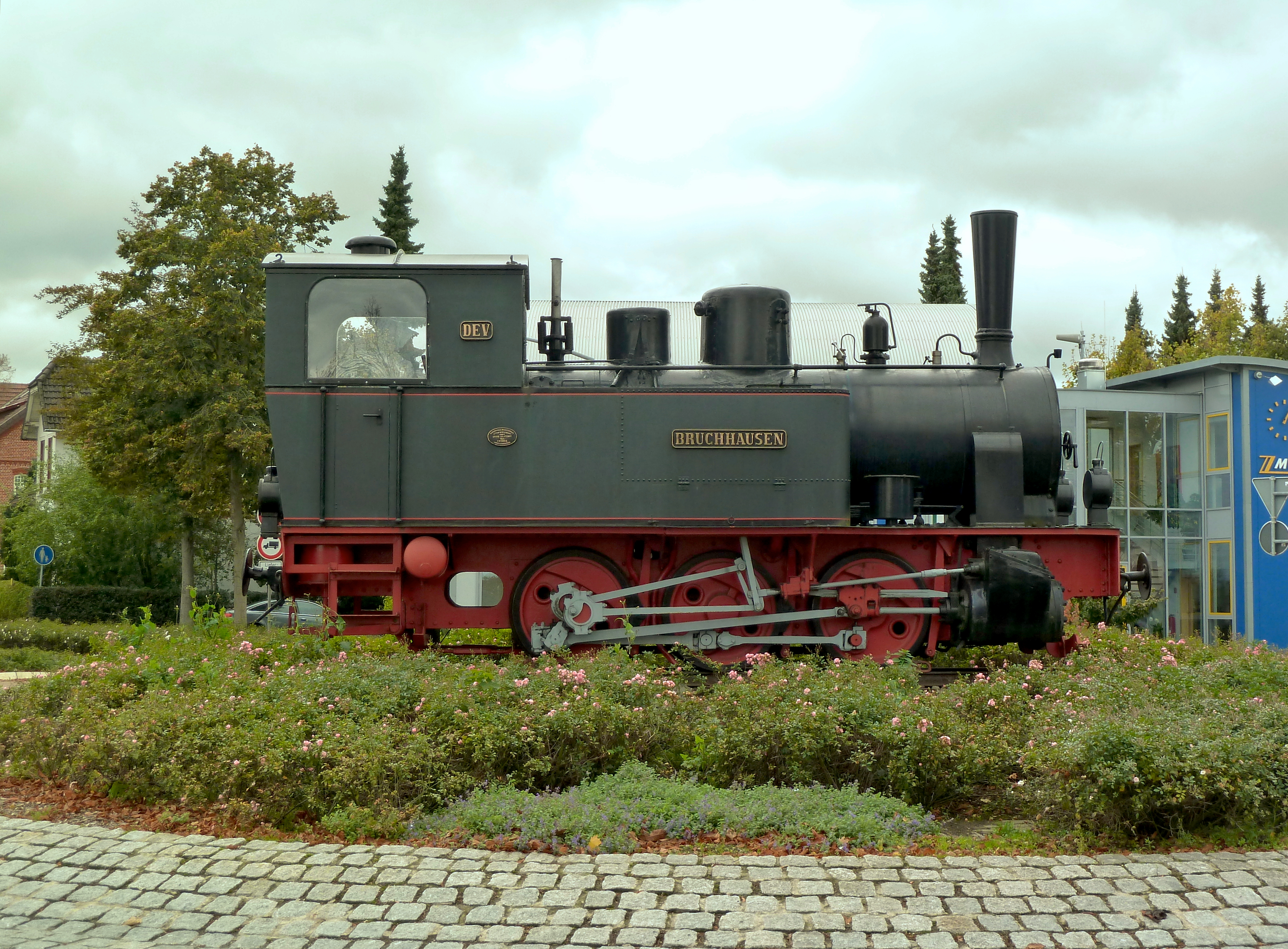 Dampflokomotive 33 „Bruchhausen“ (C n2t Hanomag 3344/1899) als Denkmal in Bruchhausen-Vilsen 16.Oktober 2010